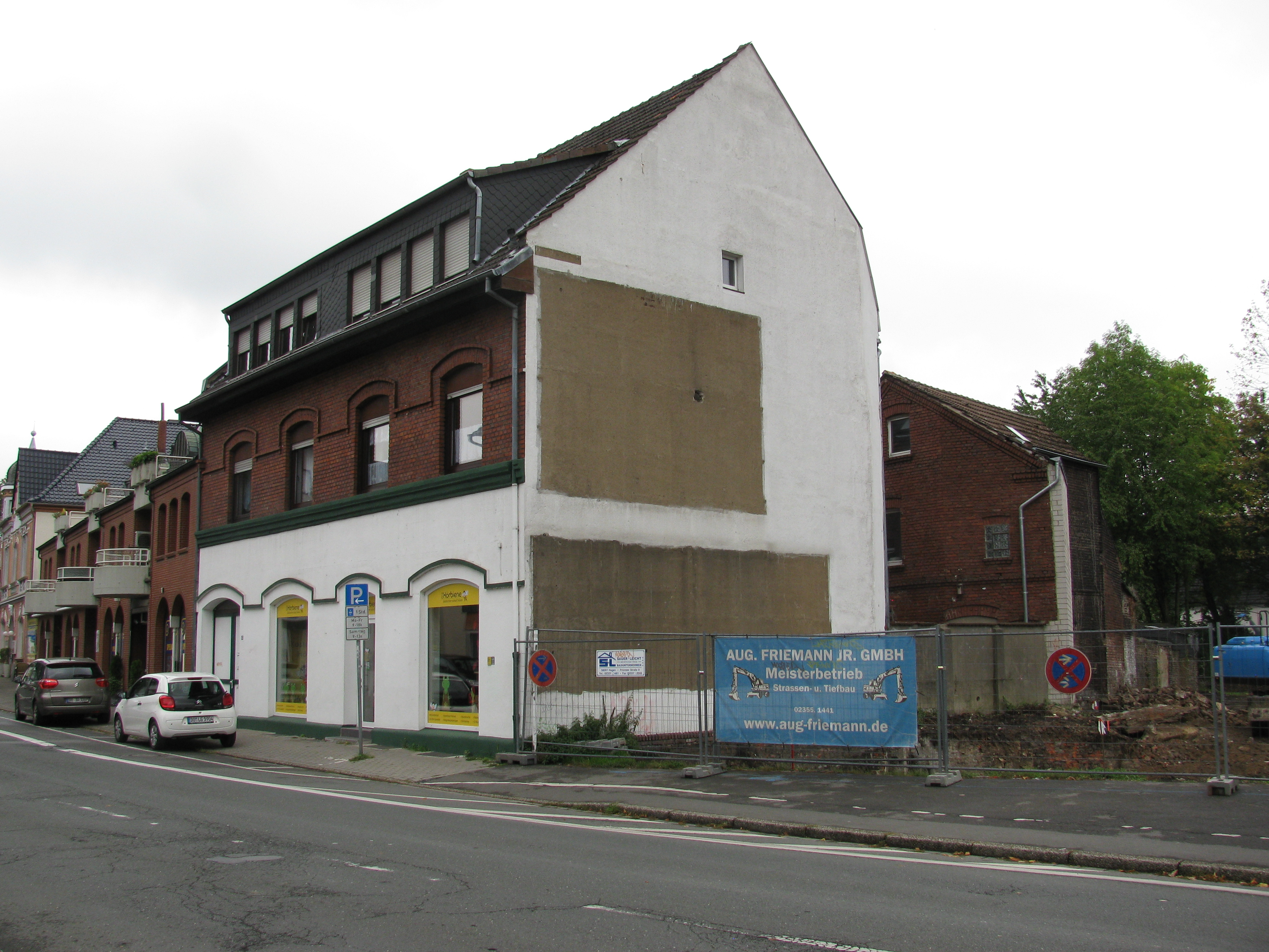 das Haus Husener Straße 63 in Dortmund